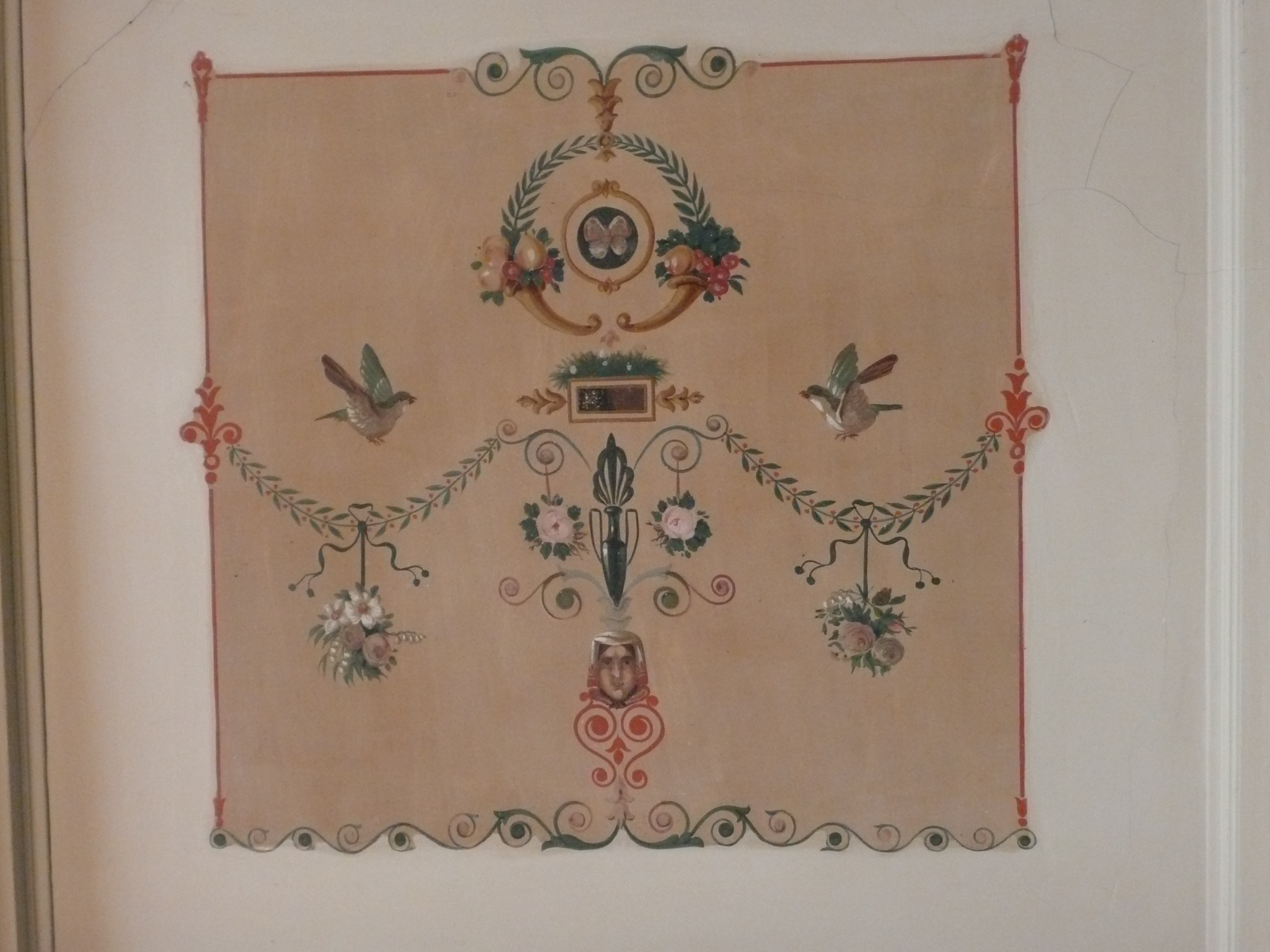 Maison annexe de la villa Ingouville à Lyon, siège de l'AMM (association médicale missionnaire) ancienne léproserie connue sous le nom de clinique du Saint-Rédempteur